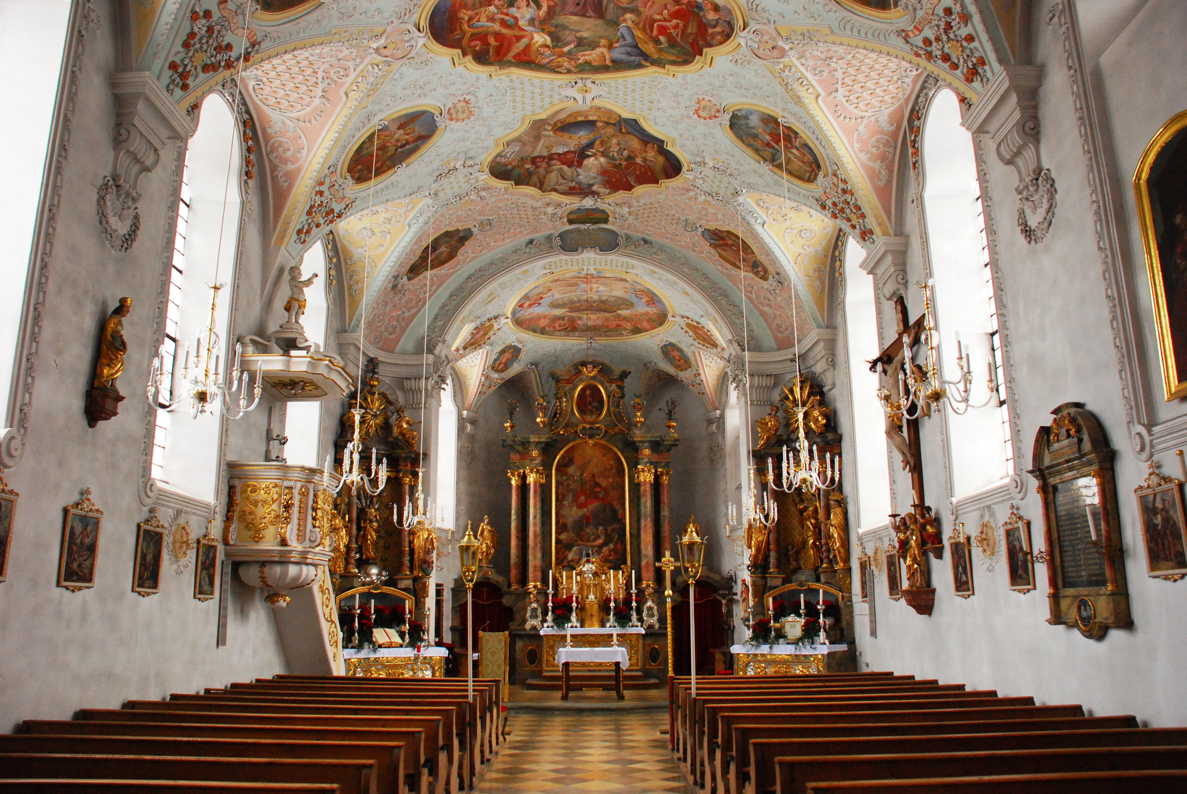 Innenraum der katholischen Pfarrkirche St. Kilian Pfarrhaus in Bad Heilbrunn, Landkreis Bad Tölz-Wolfratshausen, Regierungsbezirk Oberbayern, Bayern. Als Baudenkmal in der Bayerischen Denkmalliste aufgeführt.